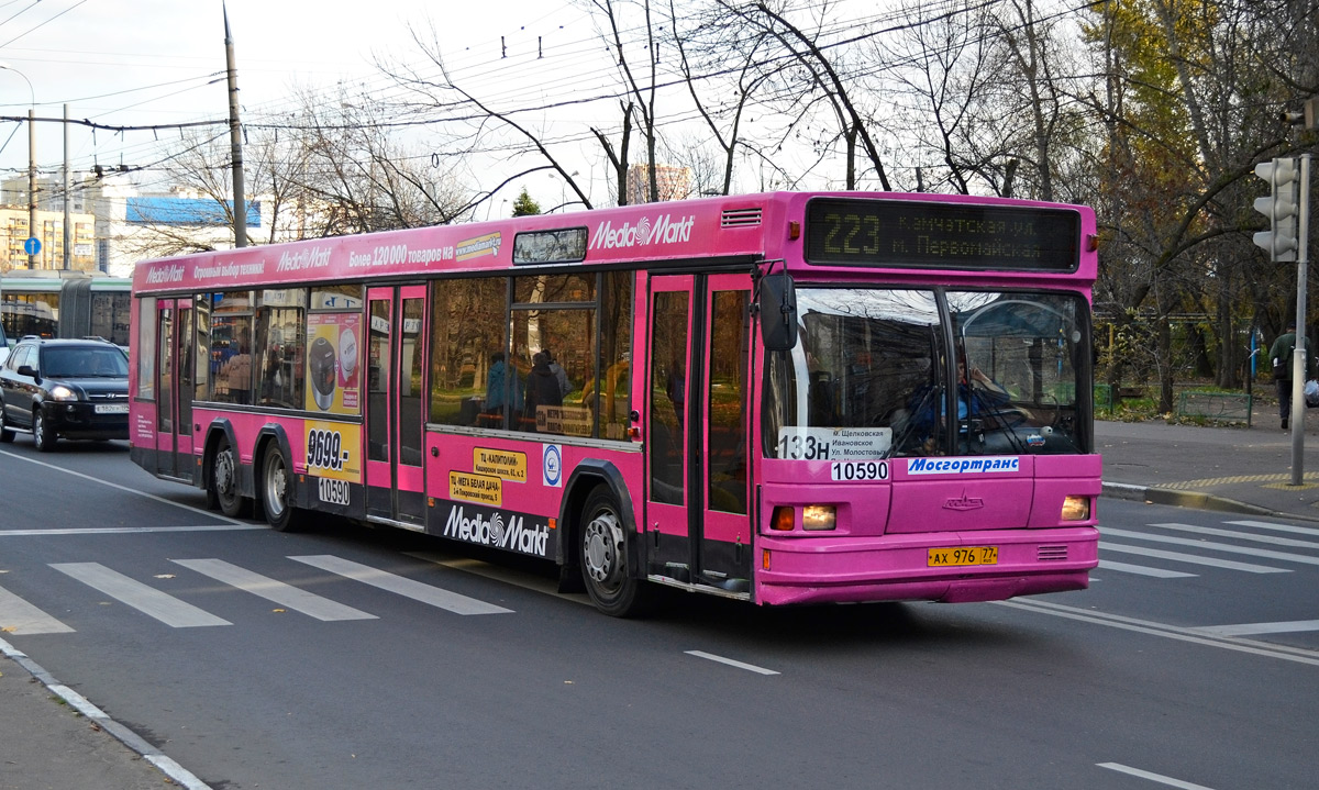 Саянская улица, маршрут №133н